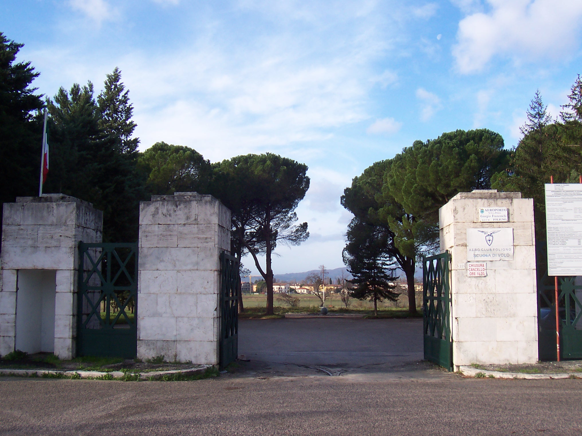 Ingresso Foligno Aeroporto